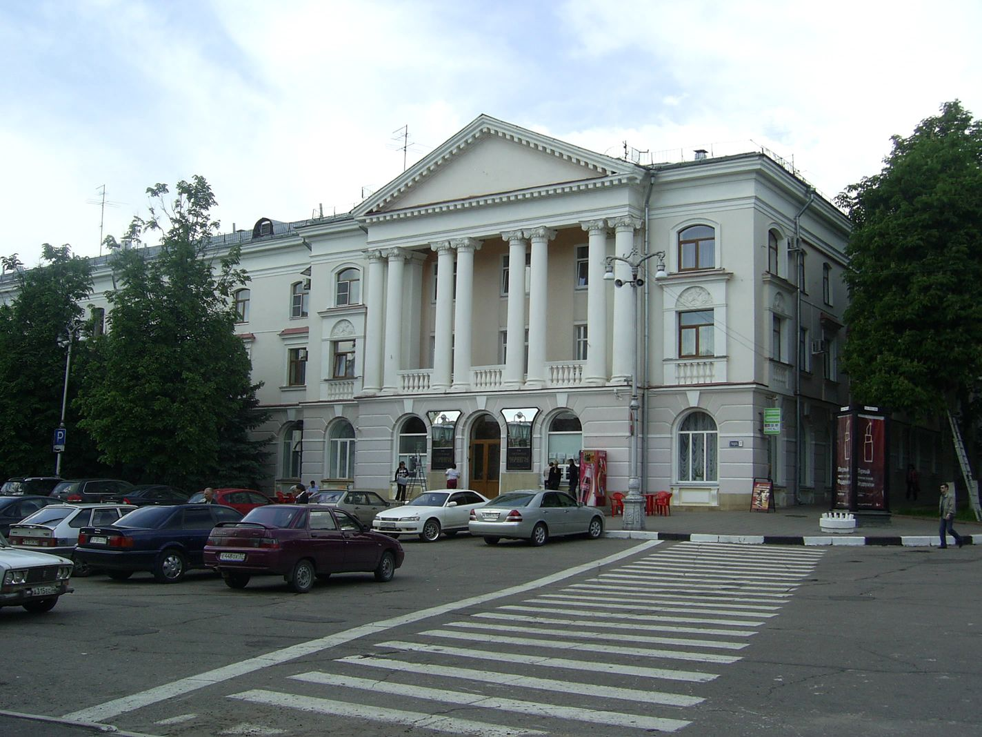 Брянск, площадь Карла Маркса (Красная пл.). Гостиница 'Чернигов'